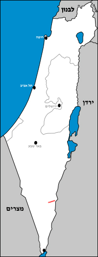 כביש 13 ישראל, בין צומת ציחור במערב, לצומת מנוחה במזרח.